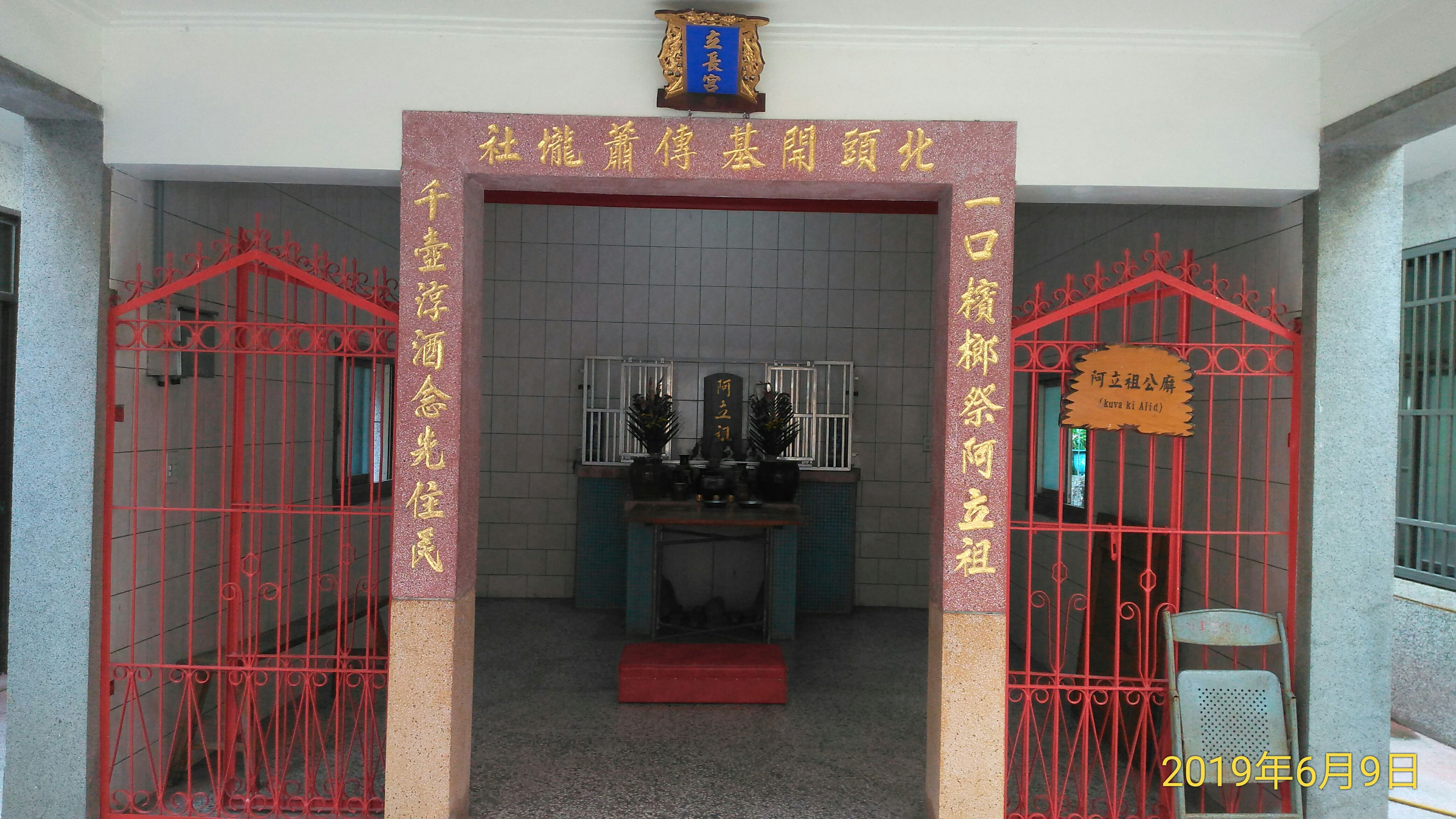 北頭洋立長宮門口，對聯為臺南文學家吳新榮所提